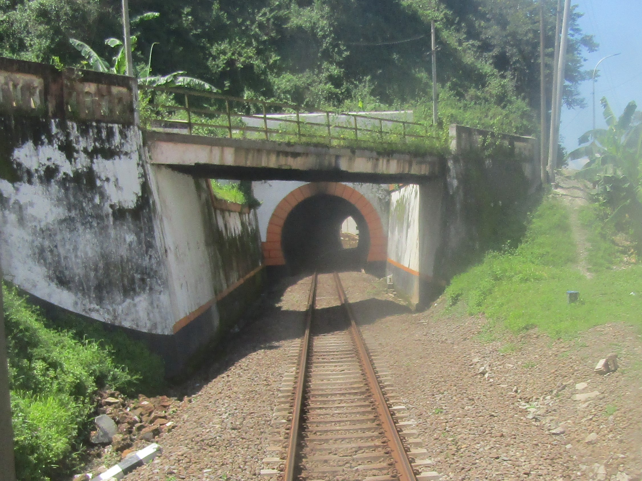 Sisi utara Terowongan Kebasen, 2019